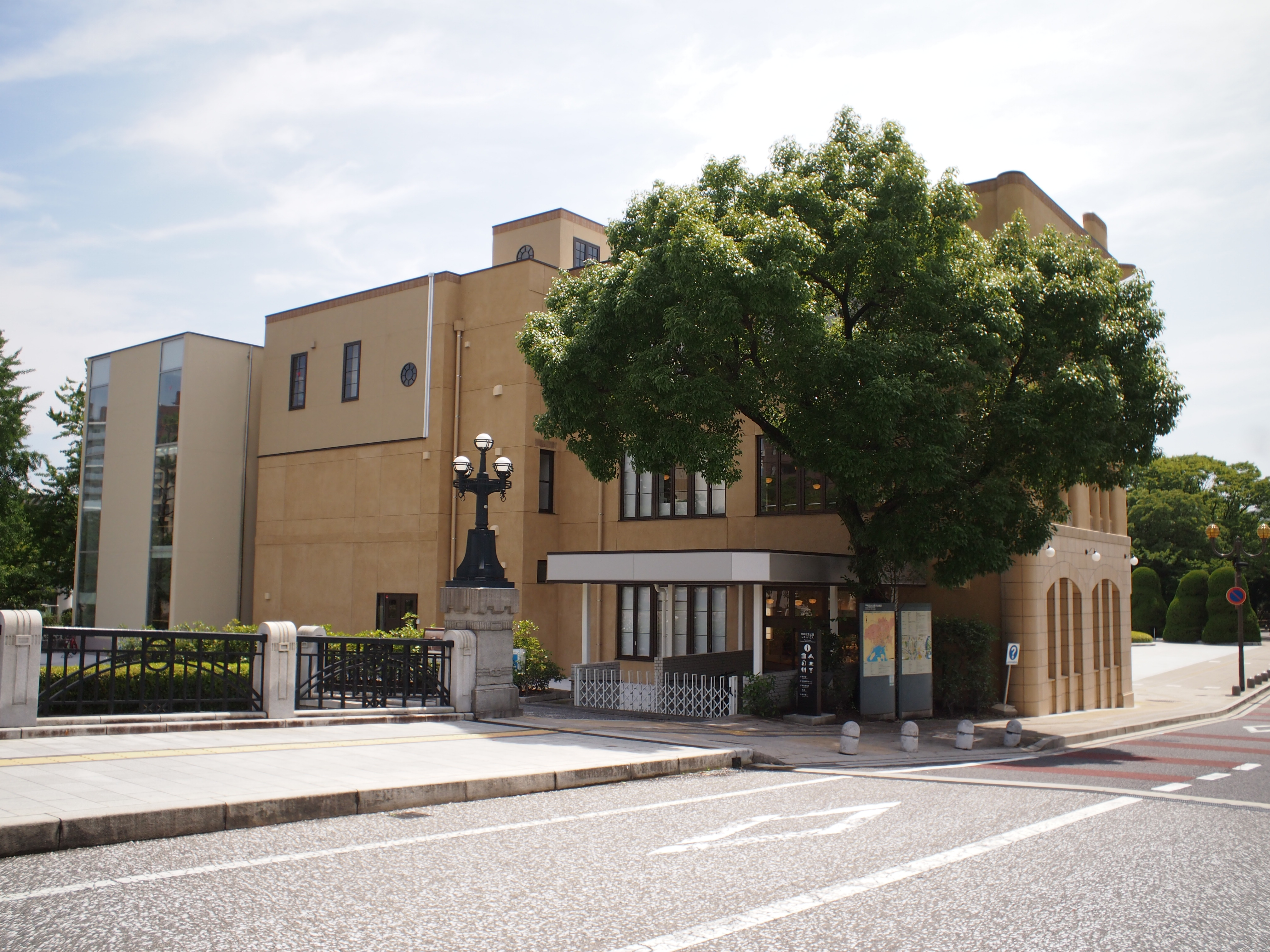 レストハウス (広島市)